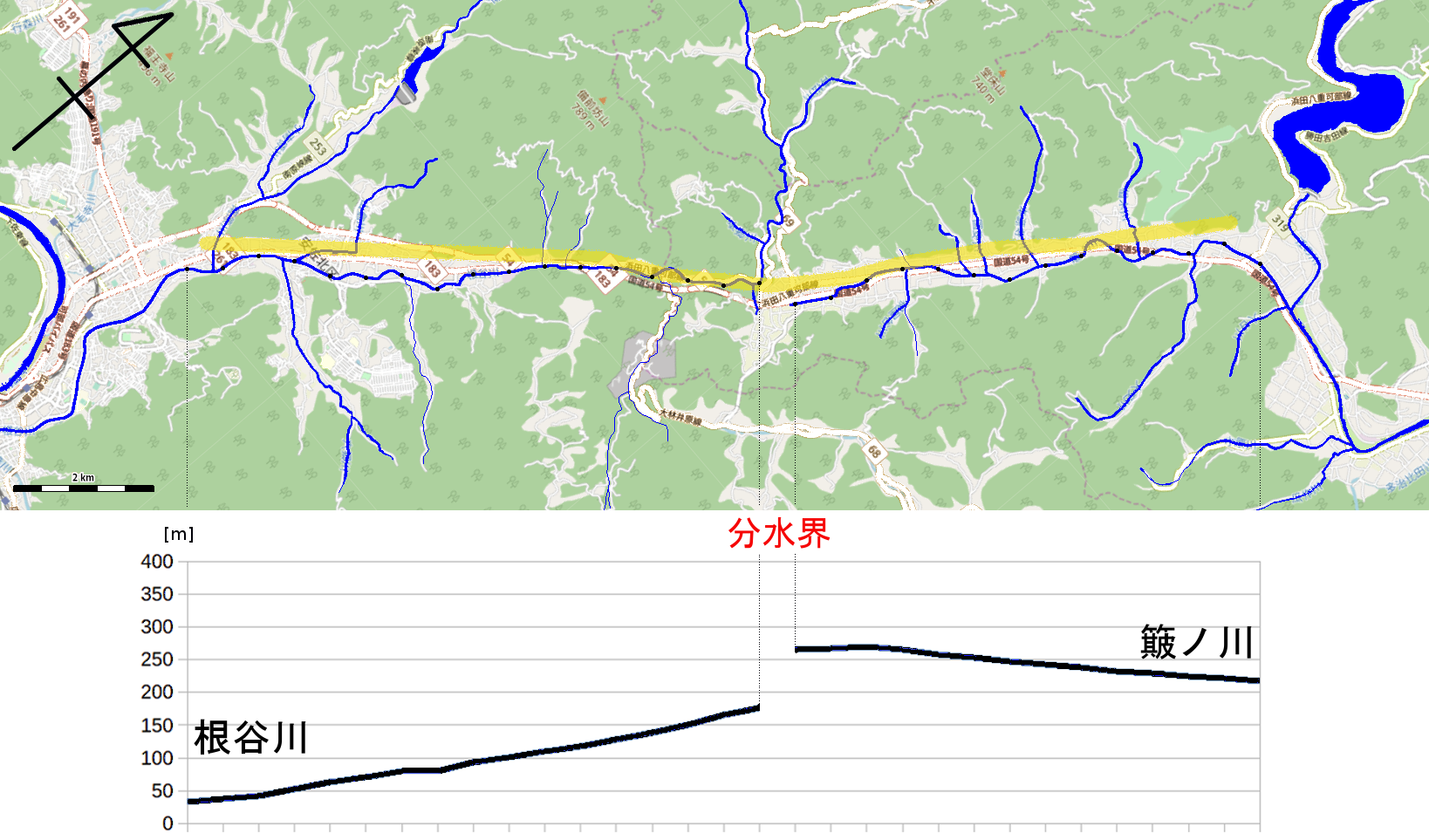 黄が上根断層。下は地図上の根谷川と簸ノ川の黒印位置の標高（河床勾配ではない）。 This map may be incomplete, and may contain errors. Don't rely solely on it for navigation.